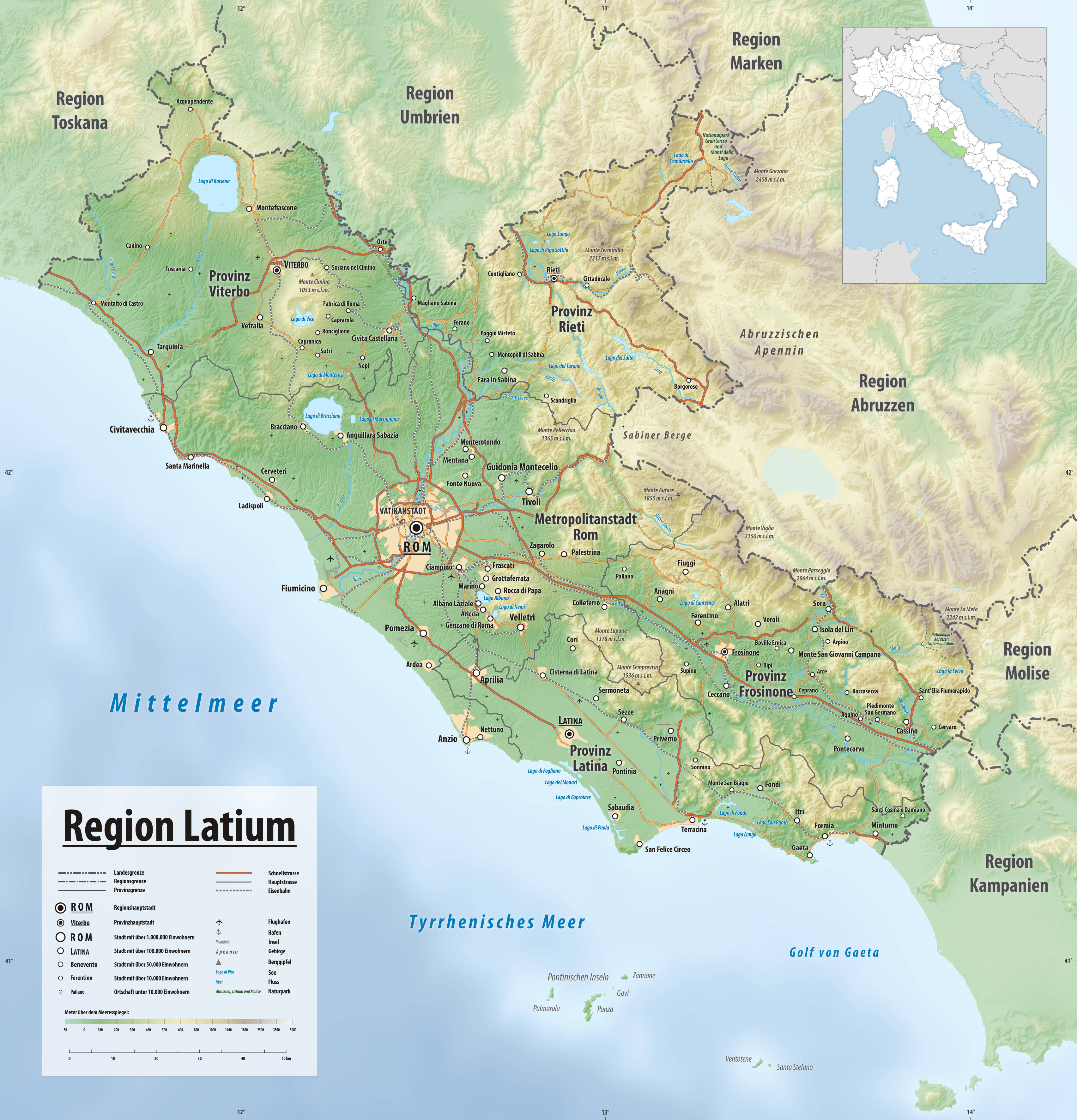 Reliefkarte der Region Latium Topographischer Hintergrund: NASA Shuttle Radar Topography Mission (public domain). SRTM3 v.2.